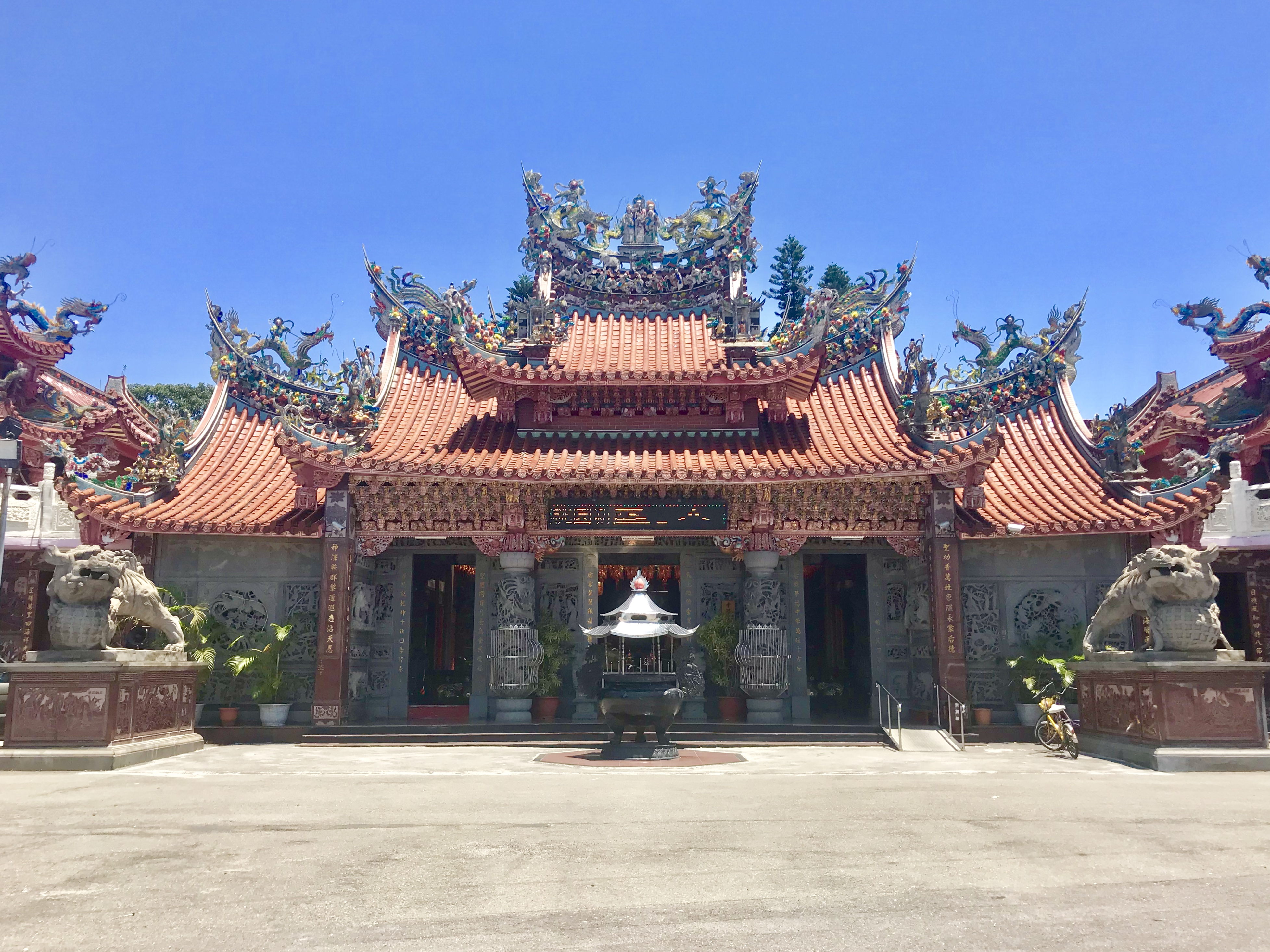 中文（台灣）: 新屋天后宮正面照